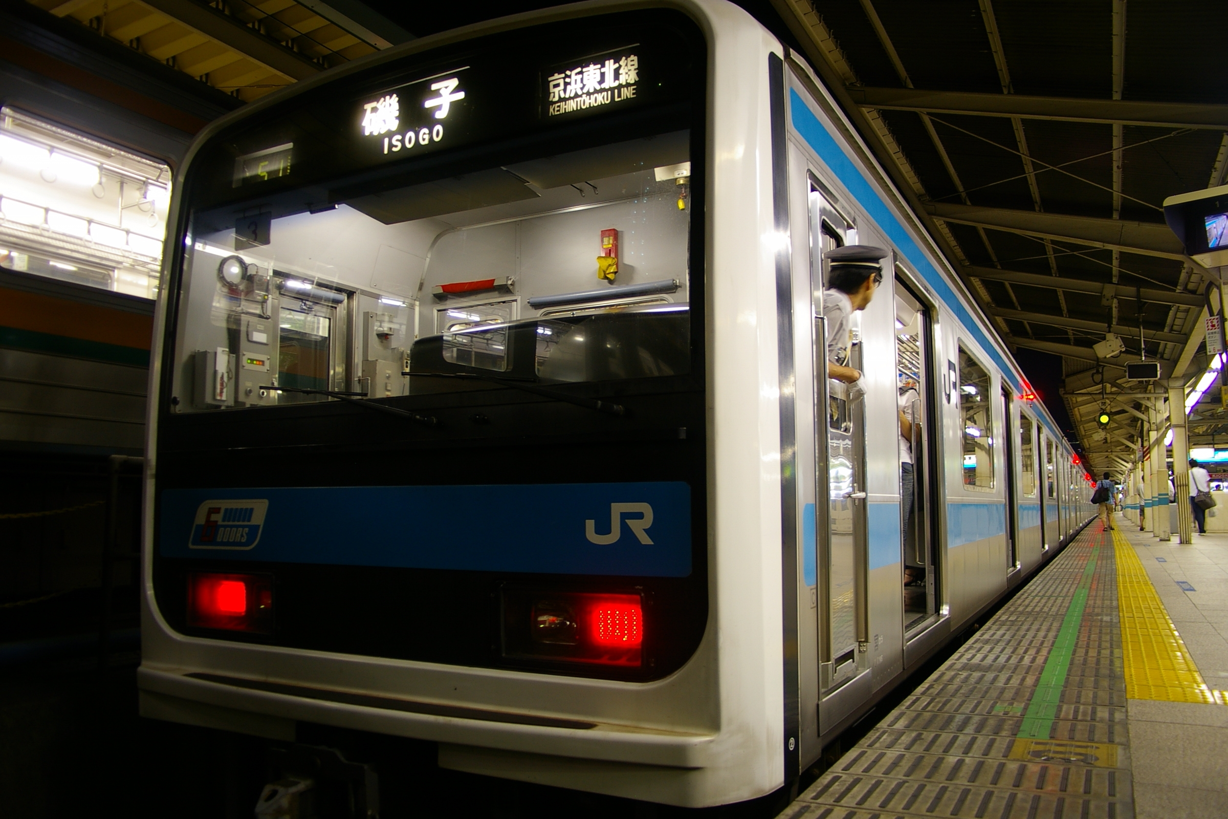 JR-EAST Keihin-Tohoku Line Tokyo sta.